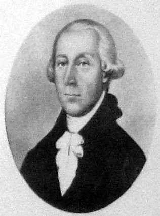 Martin Egger, österreichischer Erfinder und Jesuit. Geburt: 21.10.1832 in Zell/Tirol Sterbedatum: 29.1.1898 Tyrnau/Oberungarn (heutiges Trnava/Slowakei) Pater Martin Egger ist Professor der Physik in Mariaschein (Böhmen) und betreute die dortige physikalische Sammlung. Erfinder des Egger-Elektromotors.